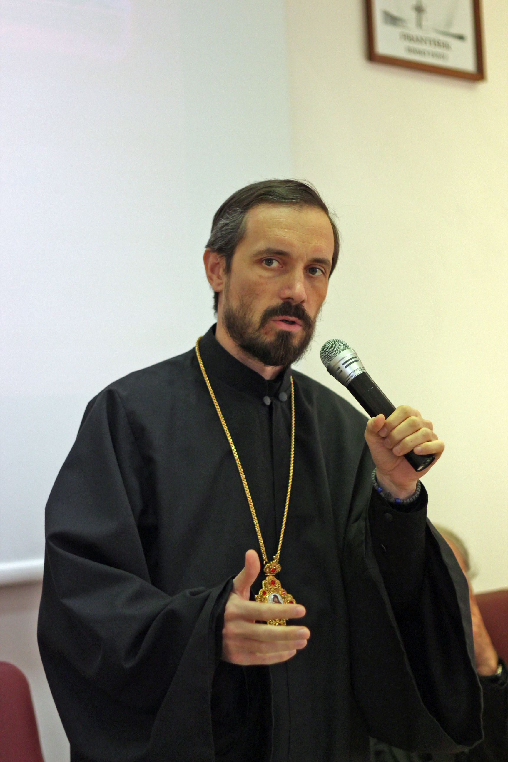 Vladyka Milan Lach SJ na Gréckokatolíckej teologickej fakulte - Prešovskej univerzity v Prešove